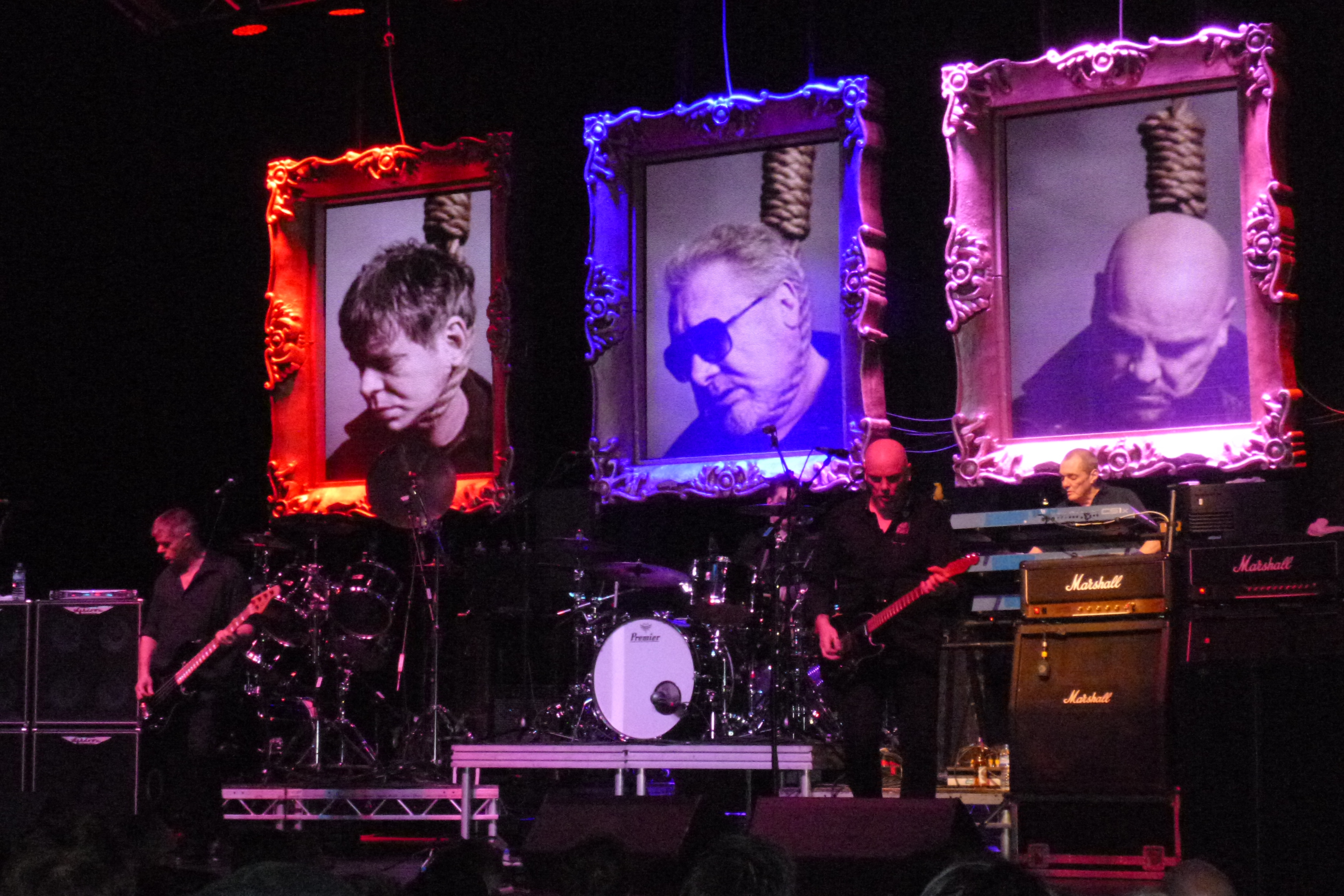 The Stranglers w Brighton 2014-03-06